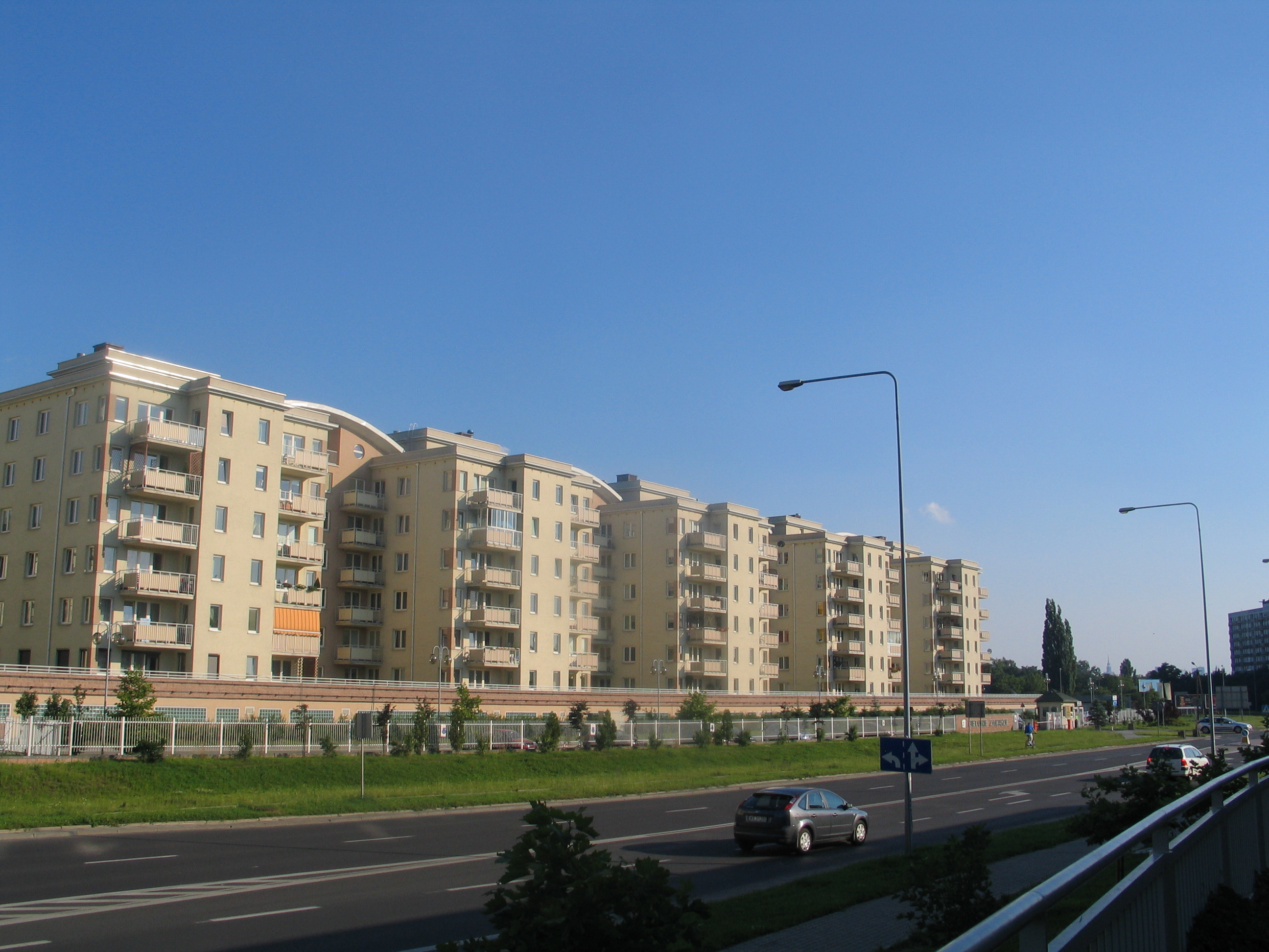 Living houses in Targówek, Warssaw